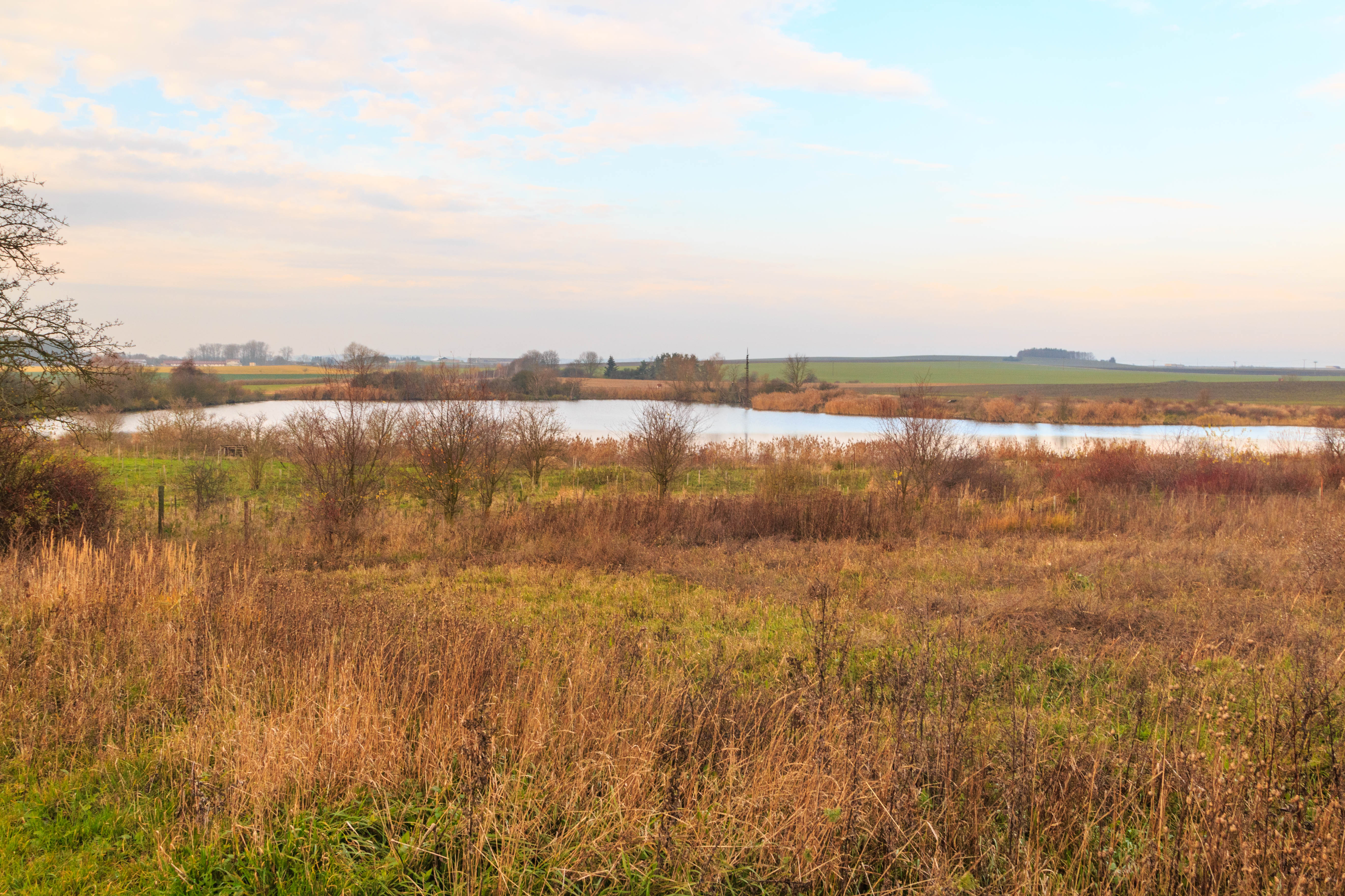 rybník Záhumeník u Malých Výklek Project: Vodstvo.